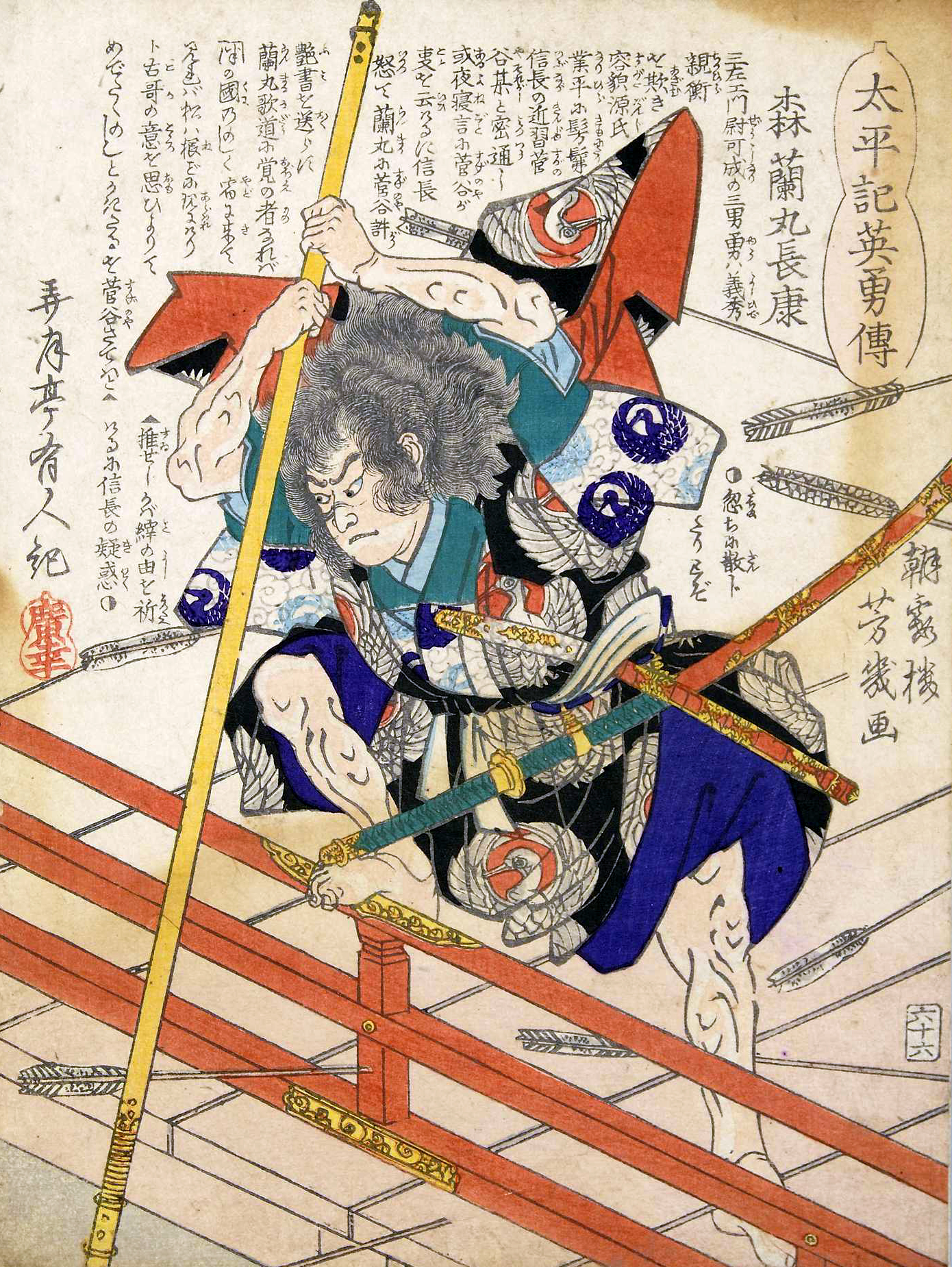 「太平記英勇伝「六十六：森蘭丸長康」